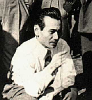 '出口辰夫（Tatsuo Deguchi）